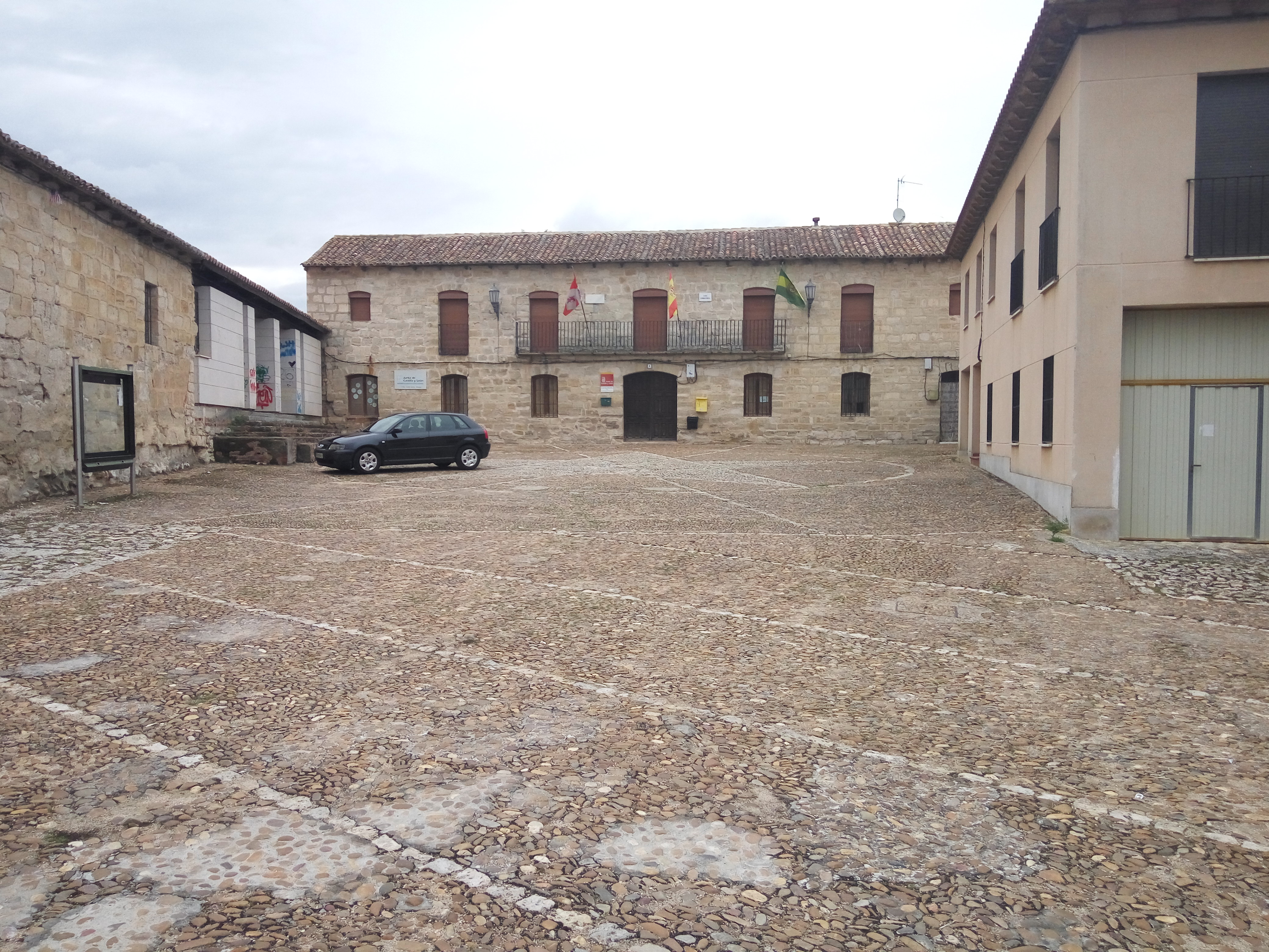 Ayuntamiento de Wamba (Valladolid)